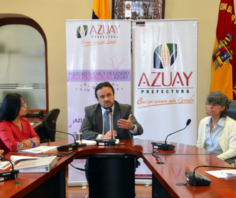 El prefecto, Paúl Carrasco dialoga con los medios sobre modelo de gestión de la Prefectura del Azuay.